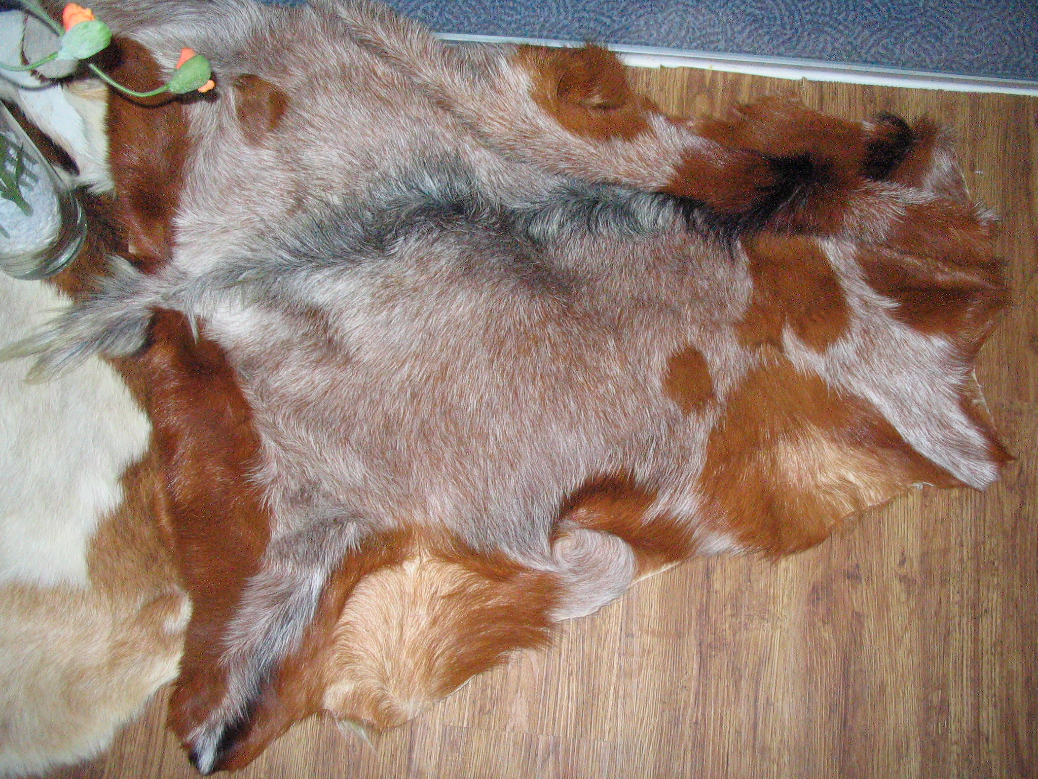 Ziegenfell